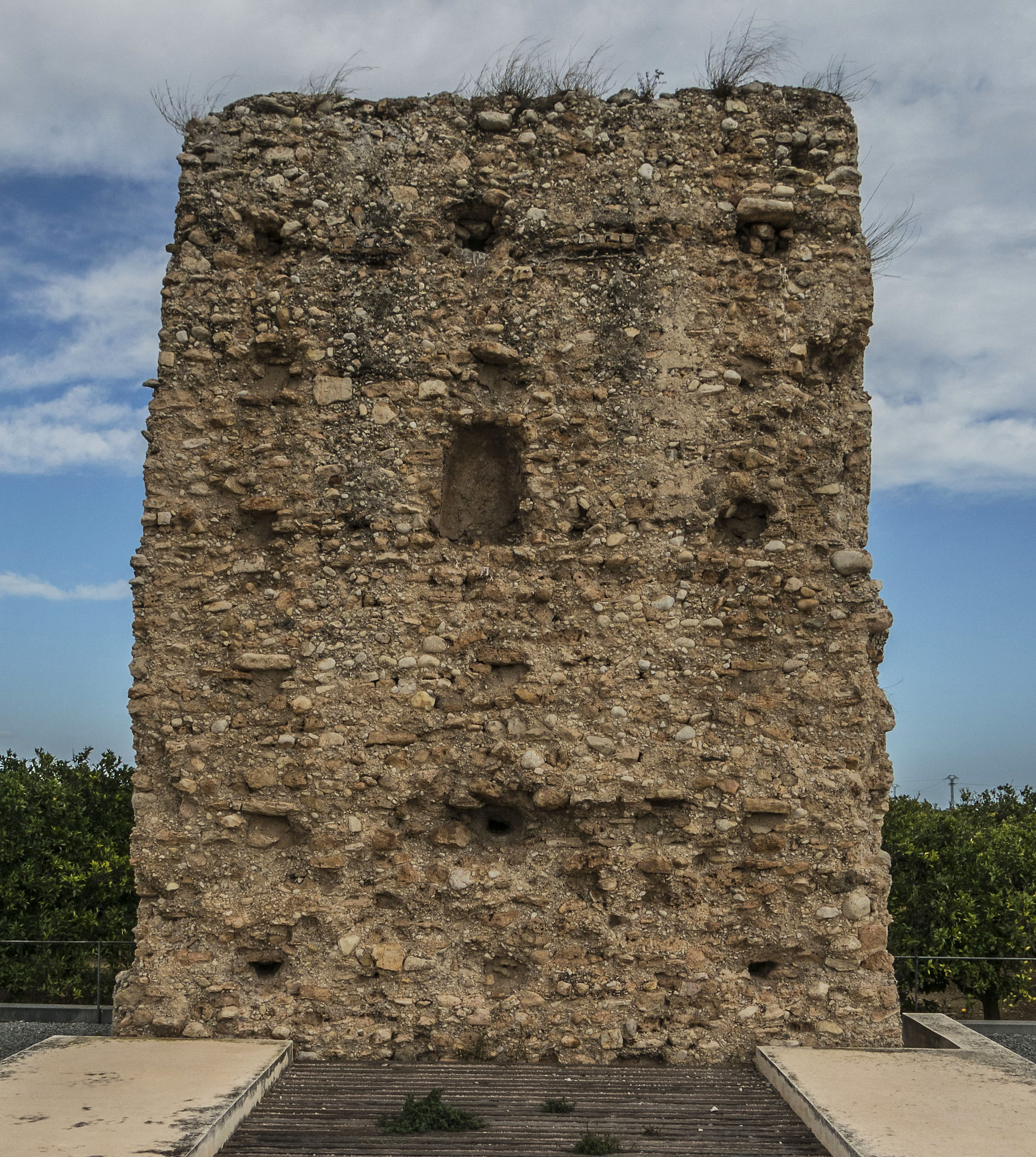 Paret de Pardines. Es tracta de l'únic que queda d'un antiquíssim poble de cristians anomenat Pardines, aquesta paret és la resta de la seua església. El retaule d'aquesta església es conserva a la Basílica Menor de Sant Jaume a la Plaça Major d'Algemesí. Prop d'ací es va establir un poble anomenat Albalat de Pardines que amb el temps es convertiria en Albalat de la Ribera.